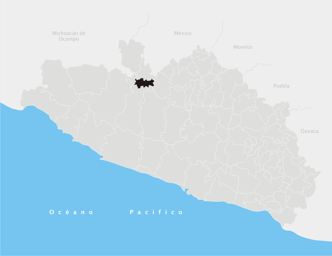 Tlapehuala en el estado de Guerrero (México)